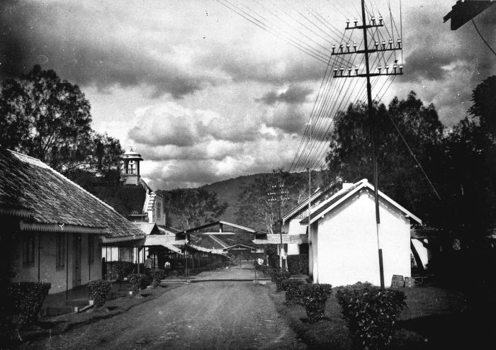 Foto. Krankzinnigengesticht Soember Porong 23 juni 1902 - 23 juni 1922. Straatgezicht in soembor porrong